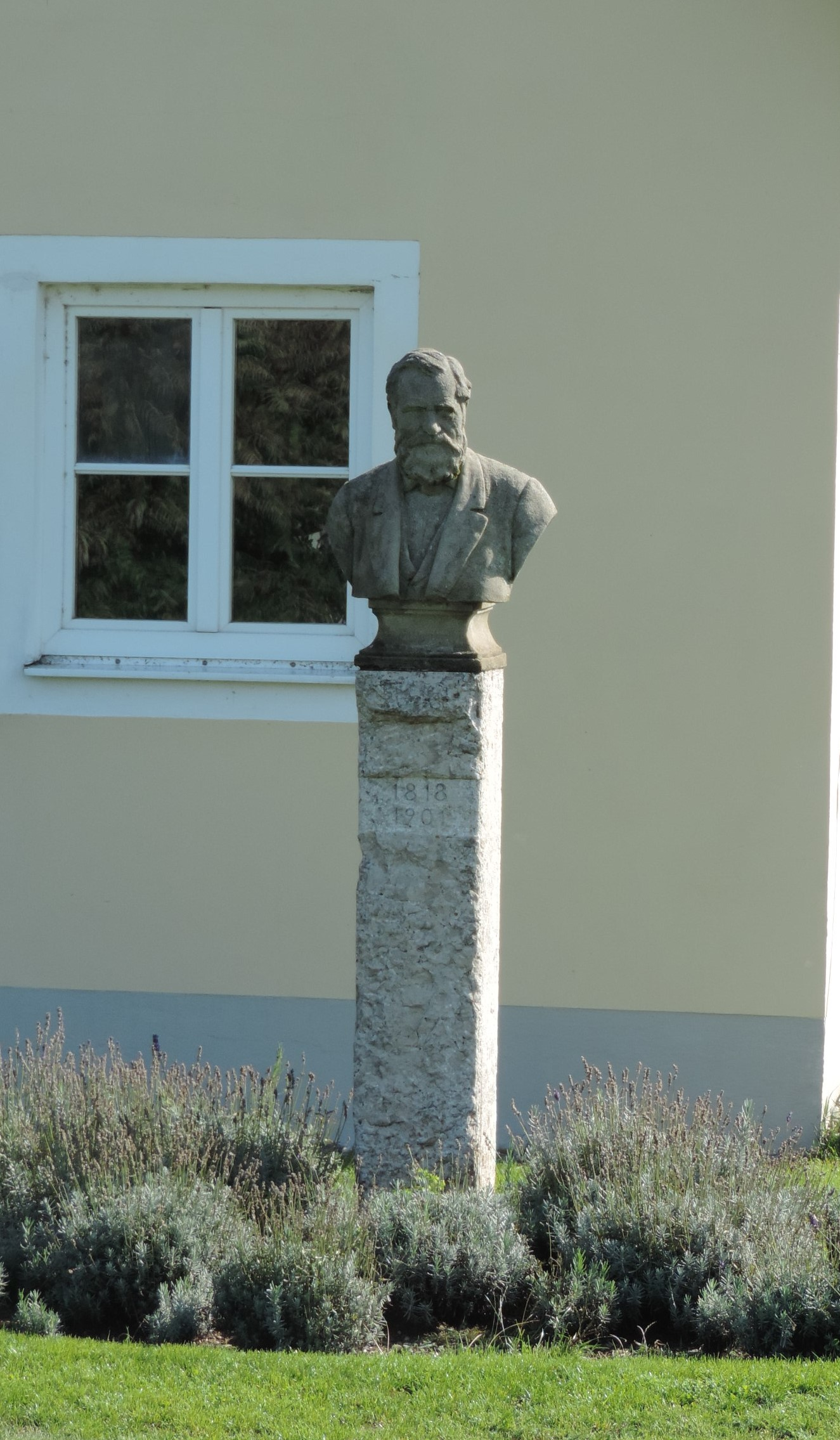 Stele von Max von Pettenkofer im Areal seines Geburtshauses